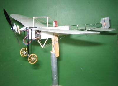 Bleriot type traversée de la Manche, 3,5g, construction carbone et polystyrène, radio 868MHz